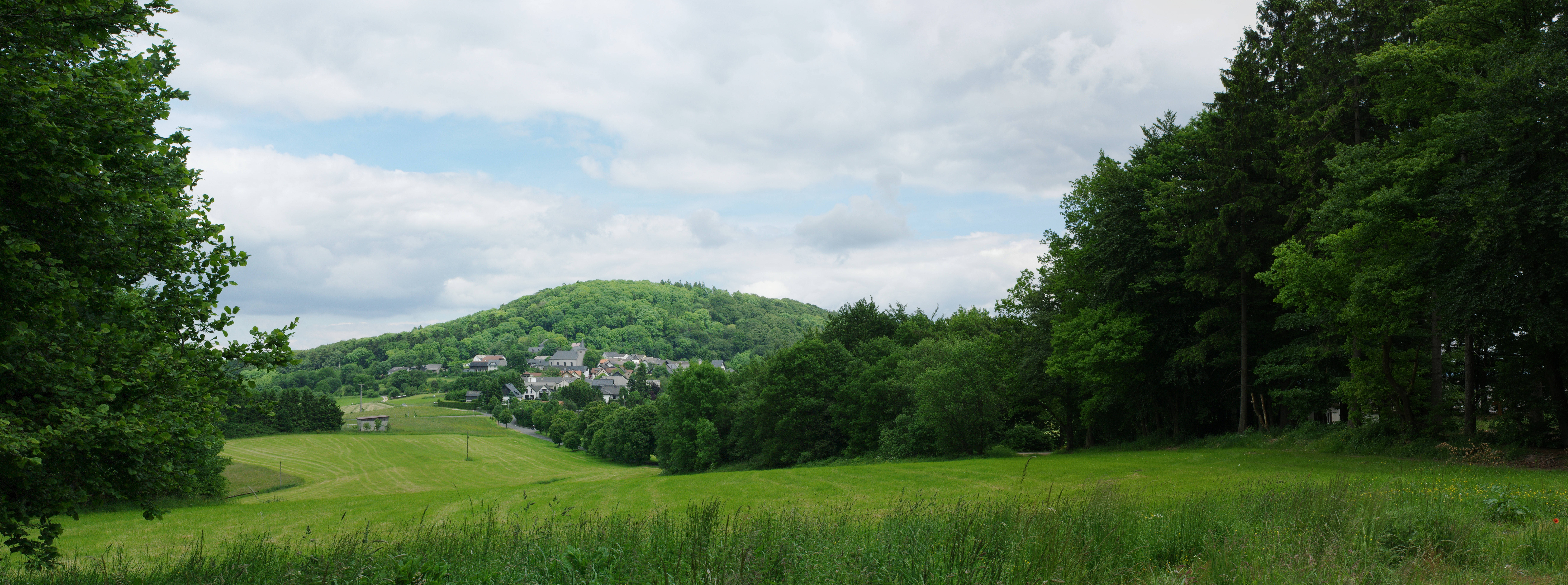 Pannographie von Aremberg sowohl Ortschaft als auch Berg